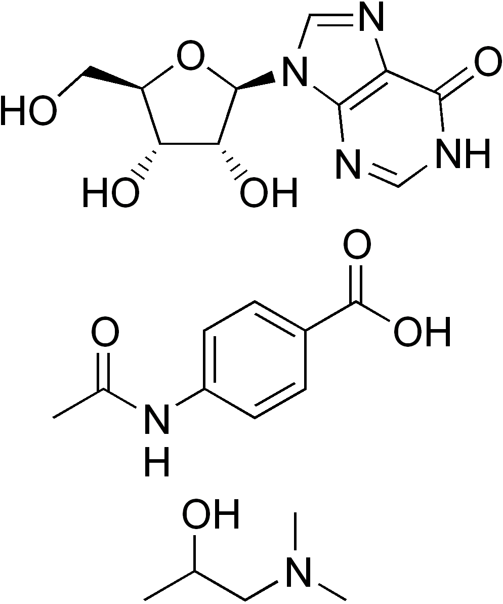 chemical structure of inosine pranobex (inosine : p-acetamidobenzoic acid : dimethylaminoisopropanol)